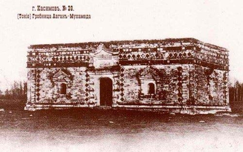 Текие Афган-Мухаммед султана - Старое фото